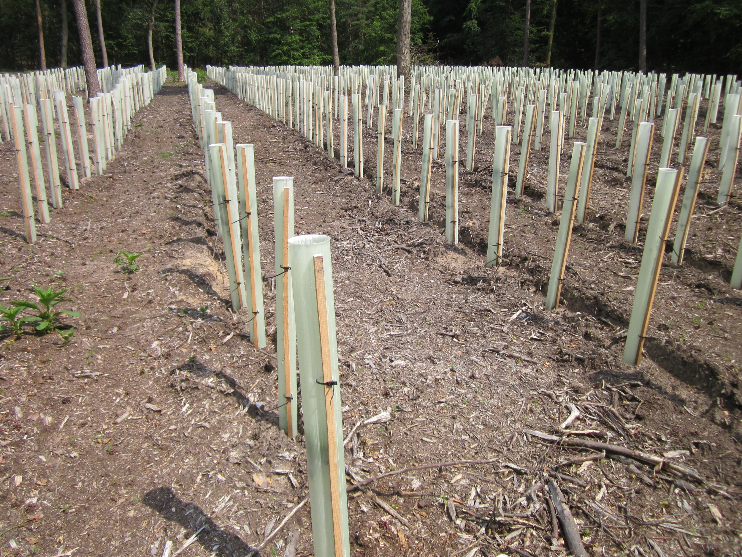 Aufforstung von Eichen im Schwetzinger Hardt